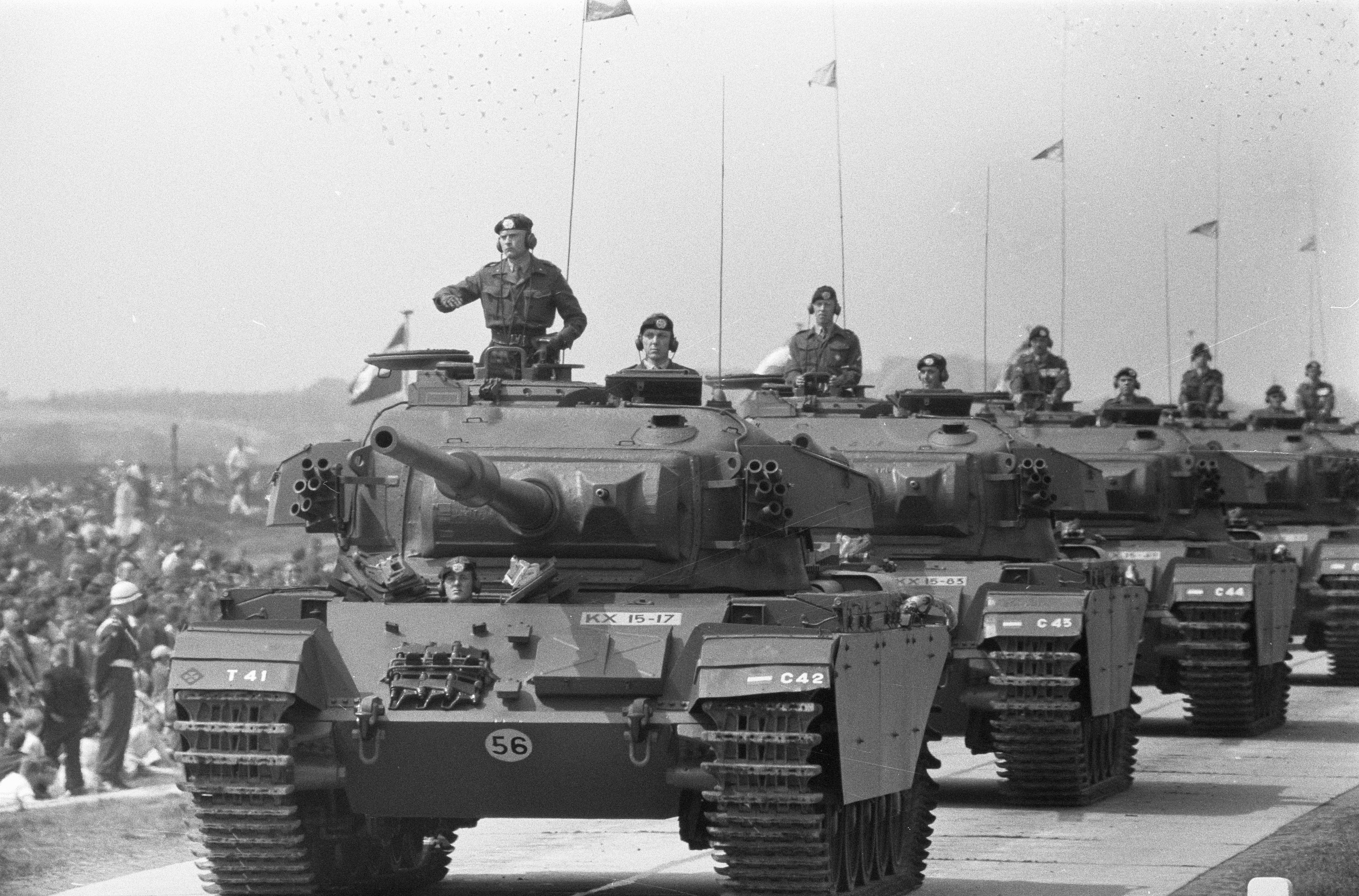 Collectie / Archief : Fotocollectie Anefo Reportage / Serie : [ onbekend ] Beschrijving : Militaire parade bij Ede voor koningin Juliana en prins Bernhard Datum : 5 mei 1960 Locatie : Ede, Gelderland Trefwoorden : militaire parades, tanks Fotograaf : Pot, Harry / Anefo Auteursrechthebbende : Nationaal Archief Materiaalsoort : Negatief (zwart/wit) Nummer archiefinventaris : bekijk toegang 2.24.01.05 Bestanddeelnummer : 911-2193